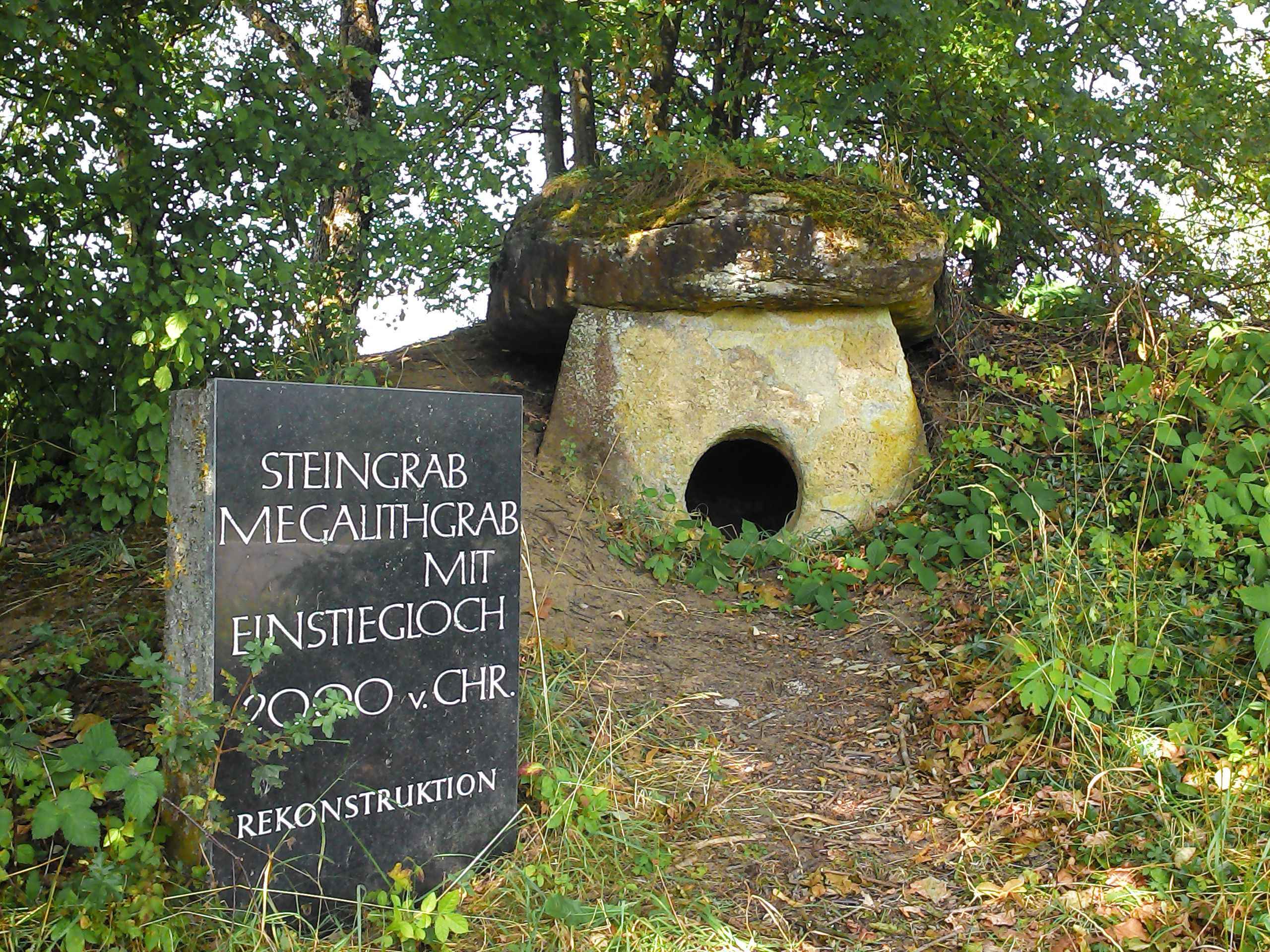 Wutöschingen-Degernau, Landkreis Waldshut, Baden-Württemberg. Dolmen der Megalithkultur.